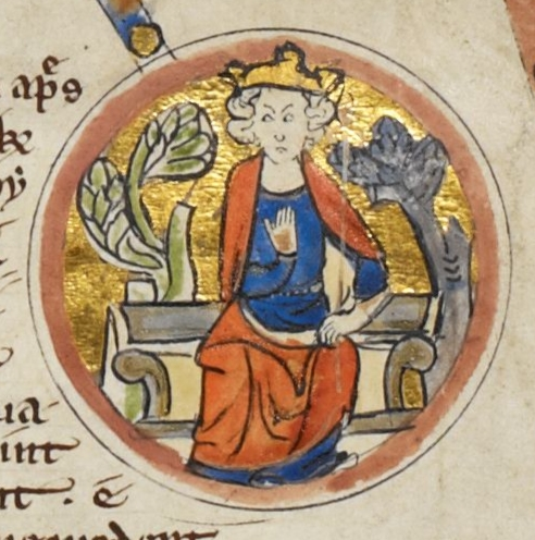 Miniature d'Æthelstan d'Angleterre dans une généalogie royale du XIIIe siècle.